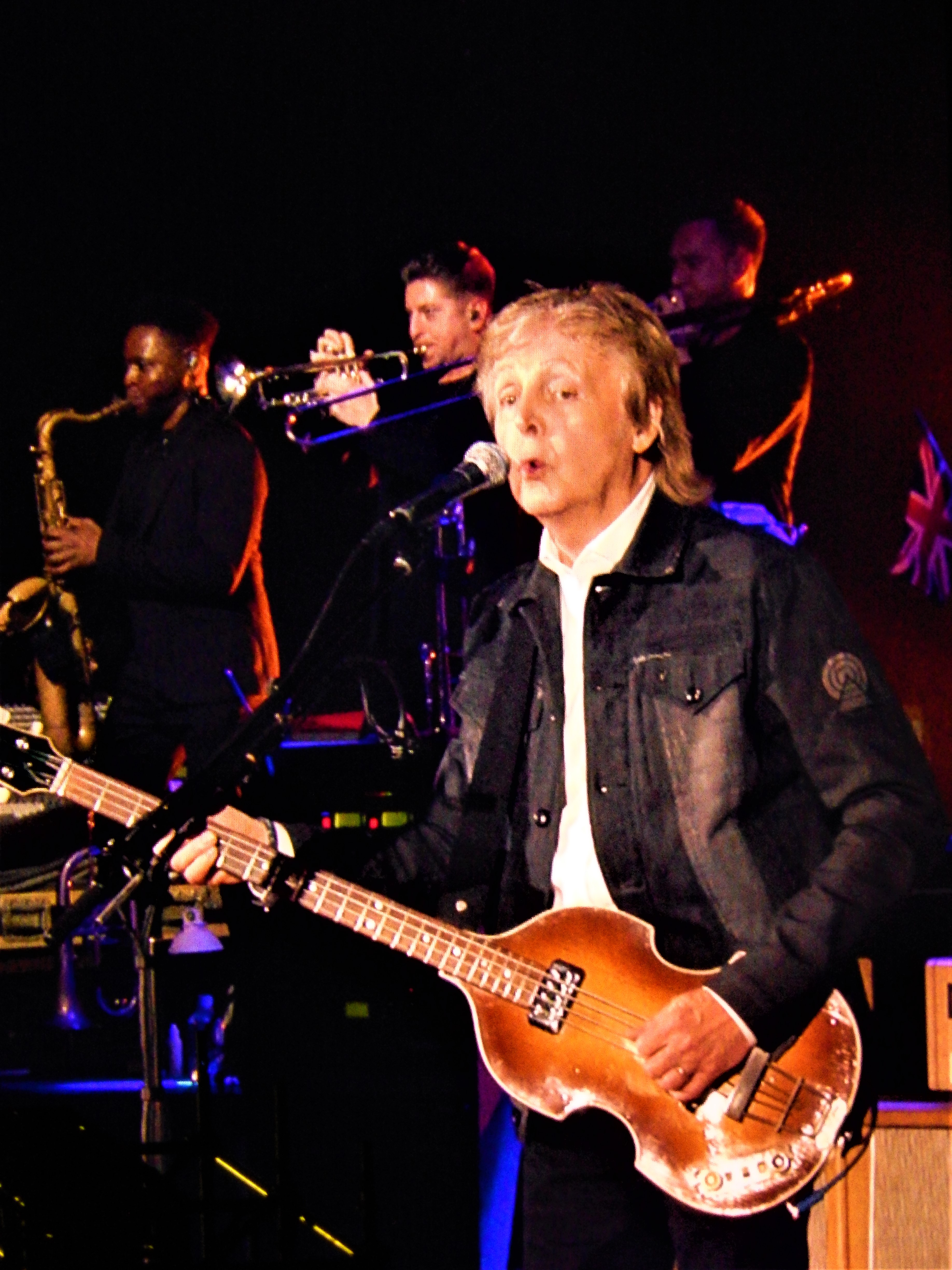 Show de Paul McCartney da turnê Freshen Up, no Allianz Parque, São Paulo Brasil, em 26 de março de 2019.